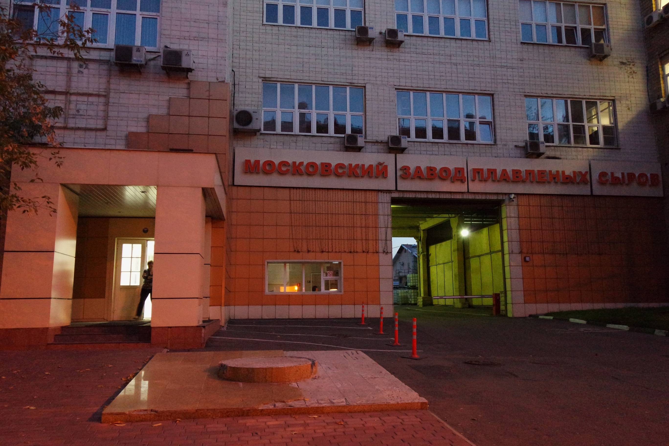 Пустой пьедестал памятника плавленному сырку «Дружба» у проходной завода «Карат»